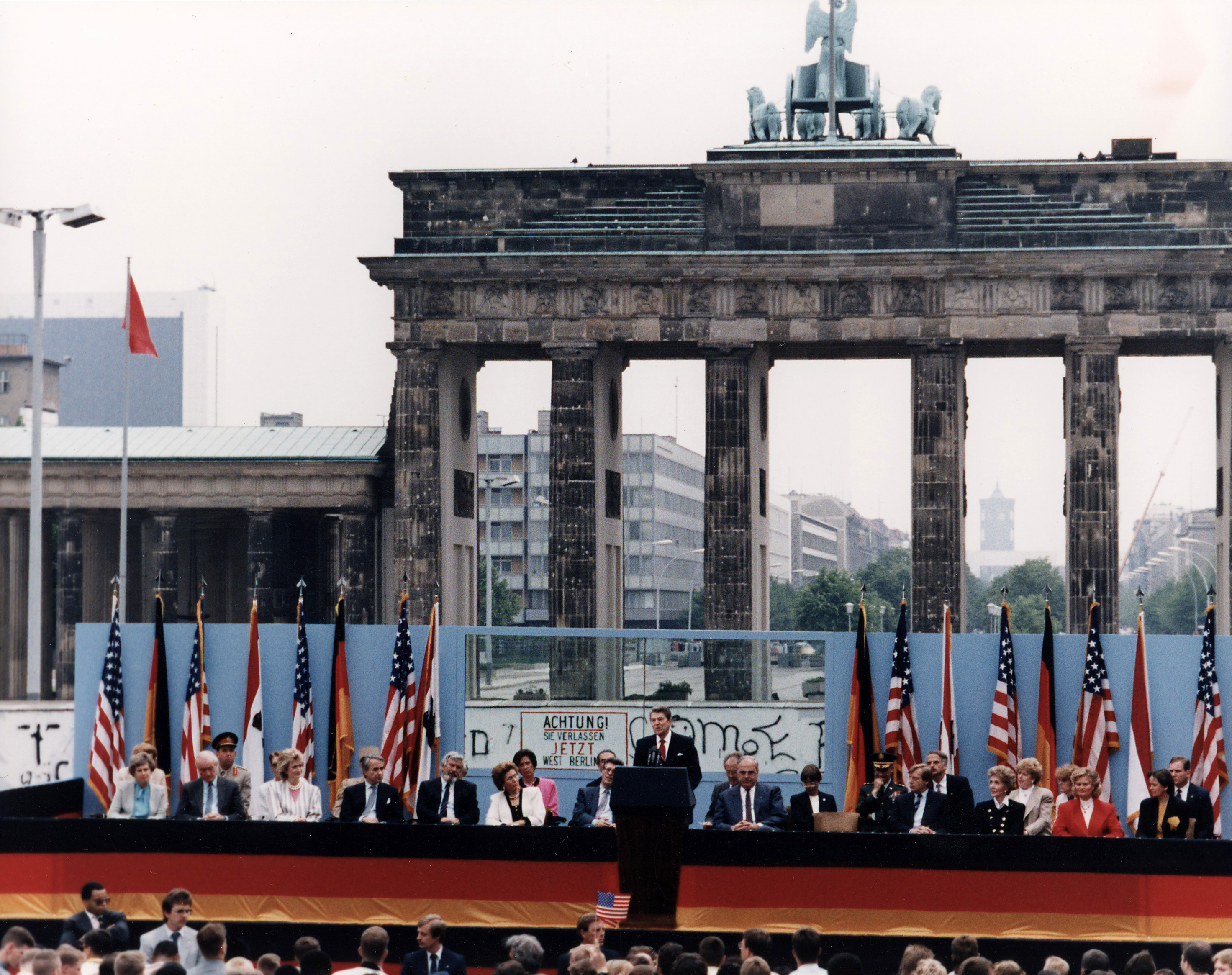 1. Reihe v.l.n.r.: ?, ?, Gahl Hodges Burt, Richard Burt, ?, ?, Philipp Jenninger, Ronald Reagan, Helmut Kohl, Eberhard Diepgen, Nancy Reagan, Hannelore Kohl